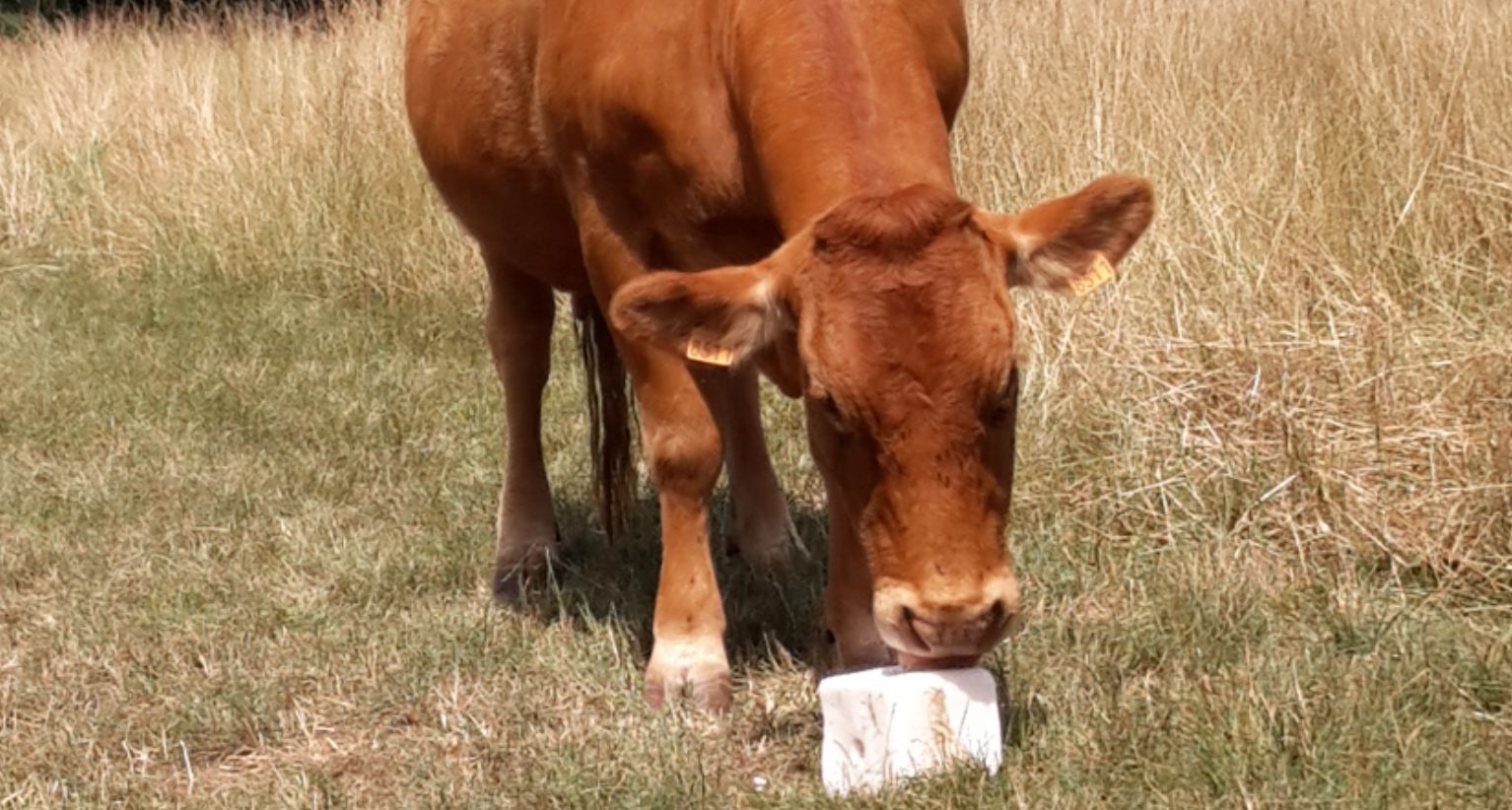 Berry, juillet 2017, vache limousine